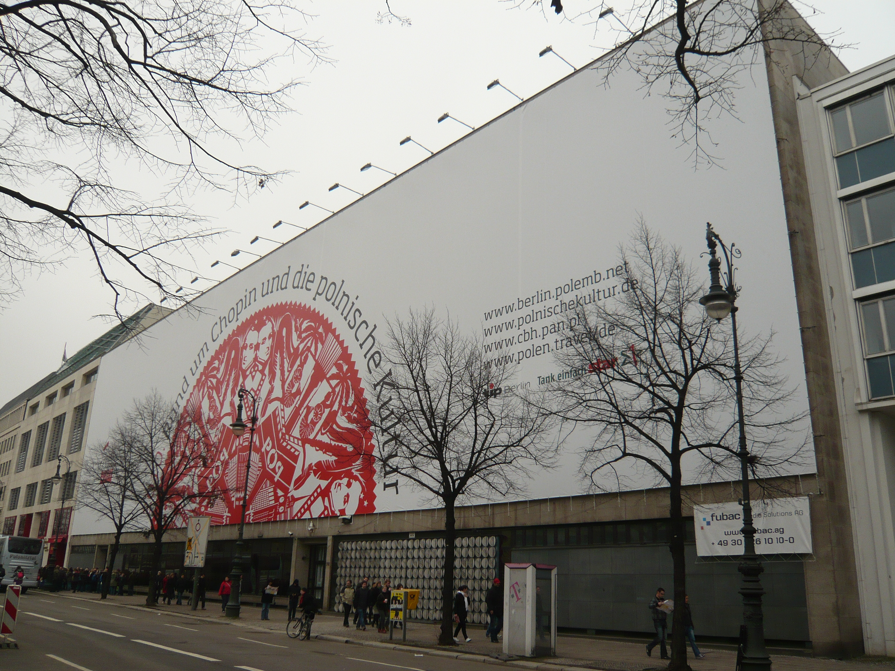 Berlin-Mitte, Polnische Botschaft